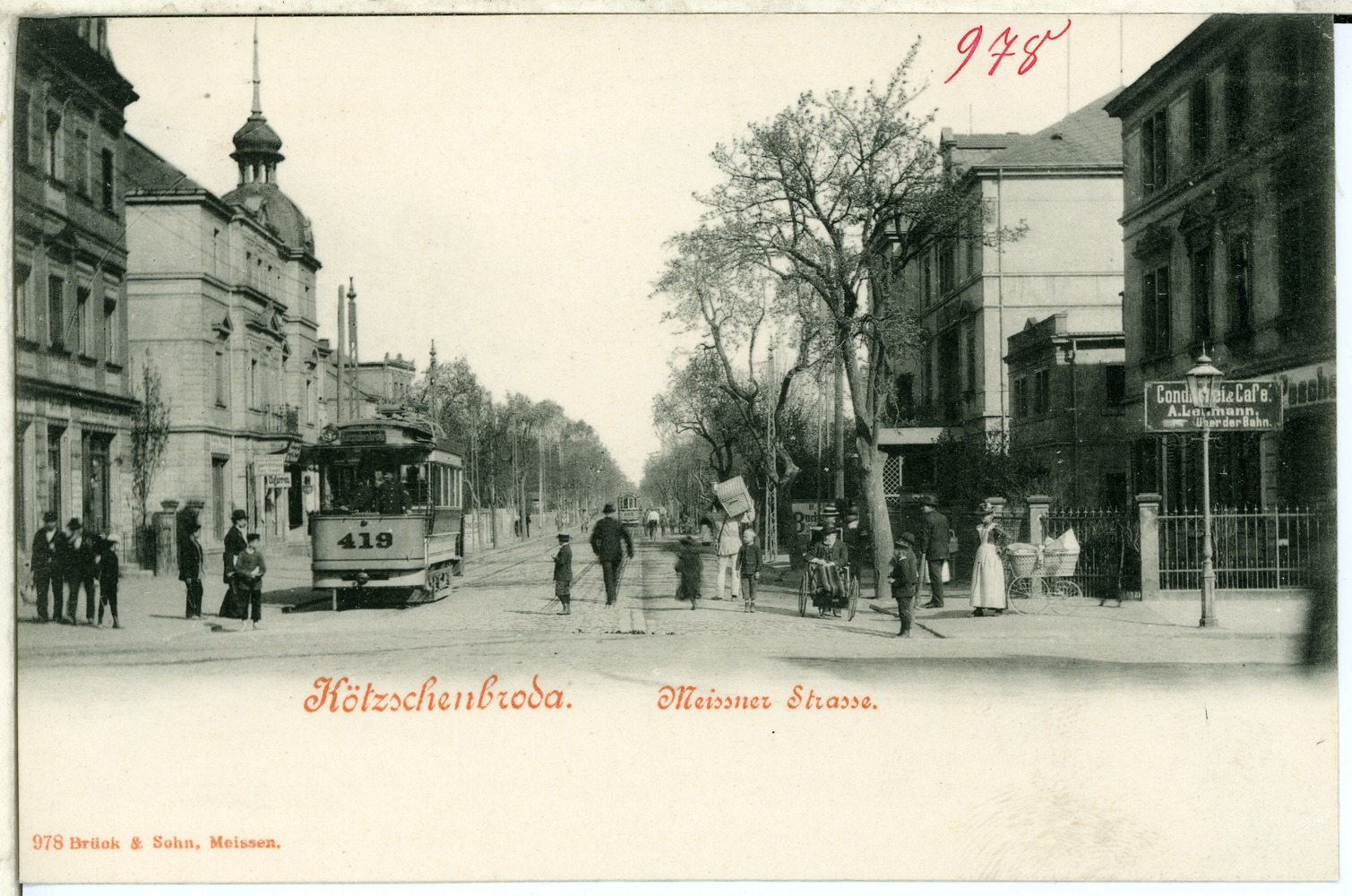 Kötzschenbroda; Meißner Straße mit Straßenbahn This postcard is from publisher Brück & Sohn in Meißen ( postcard has a unique number 00978 and is available in a higher resolution at the publisher. This images was uploaded in a cooperation project between Wikipedians and the publisher.